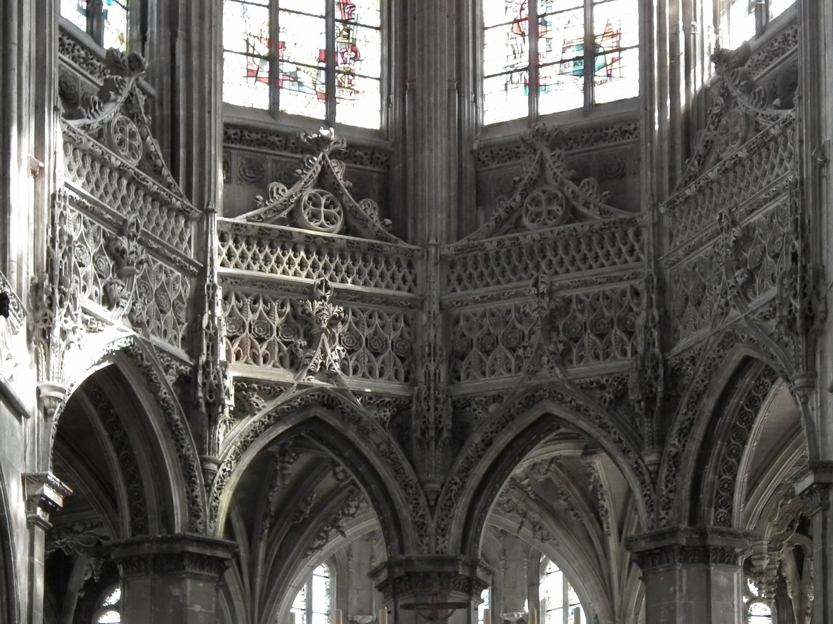 Église Saint-Pierre, Caen, France